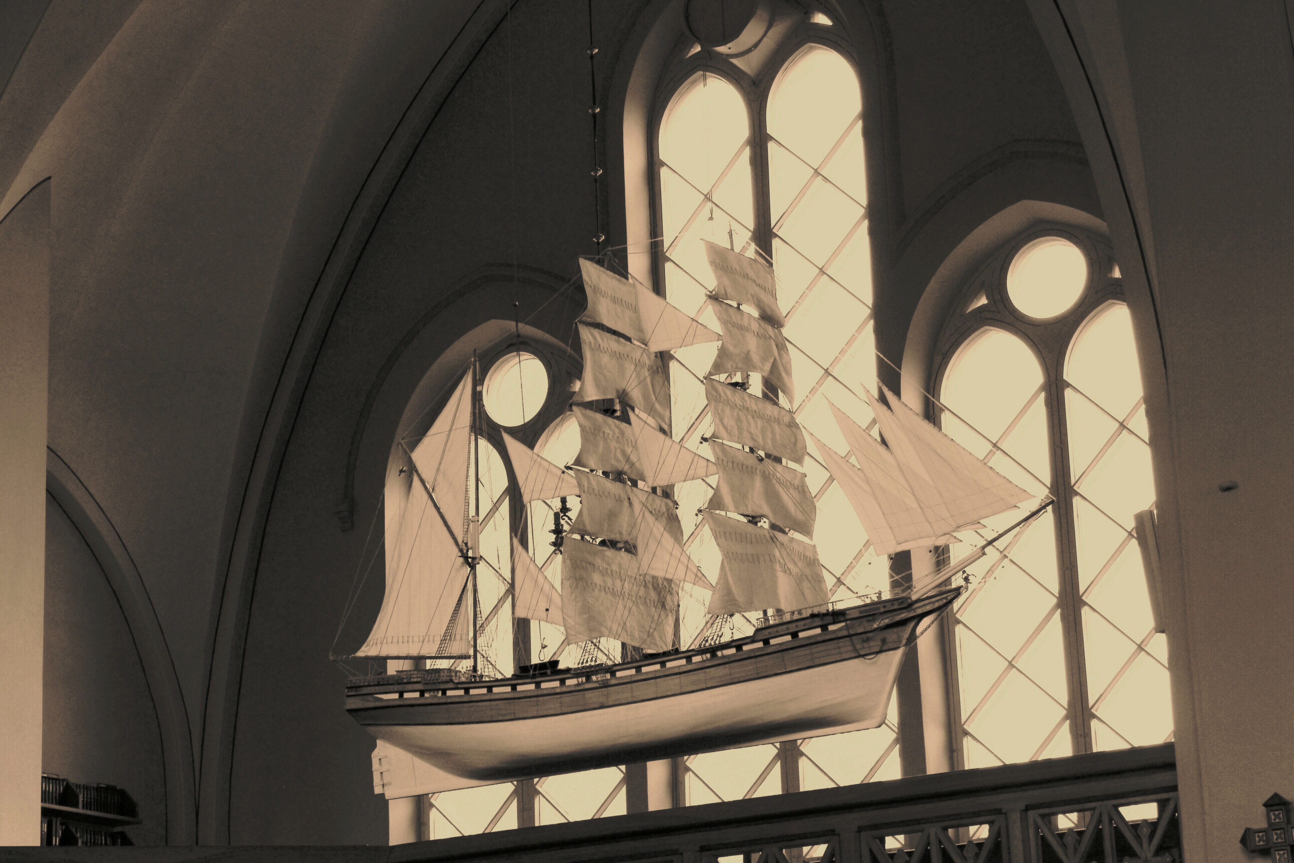 Kemin kirkon kirkkolaiva.